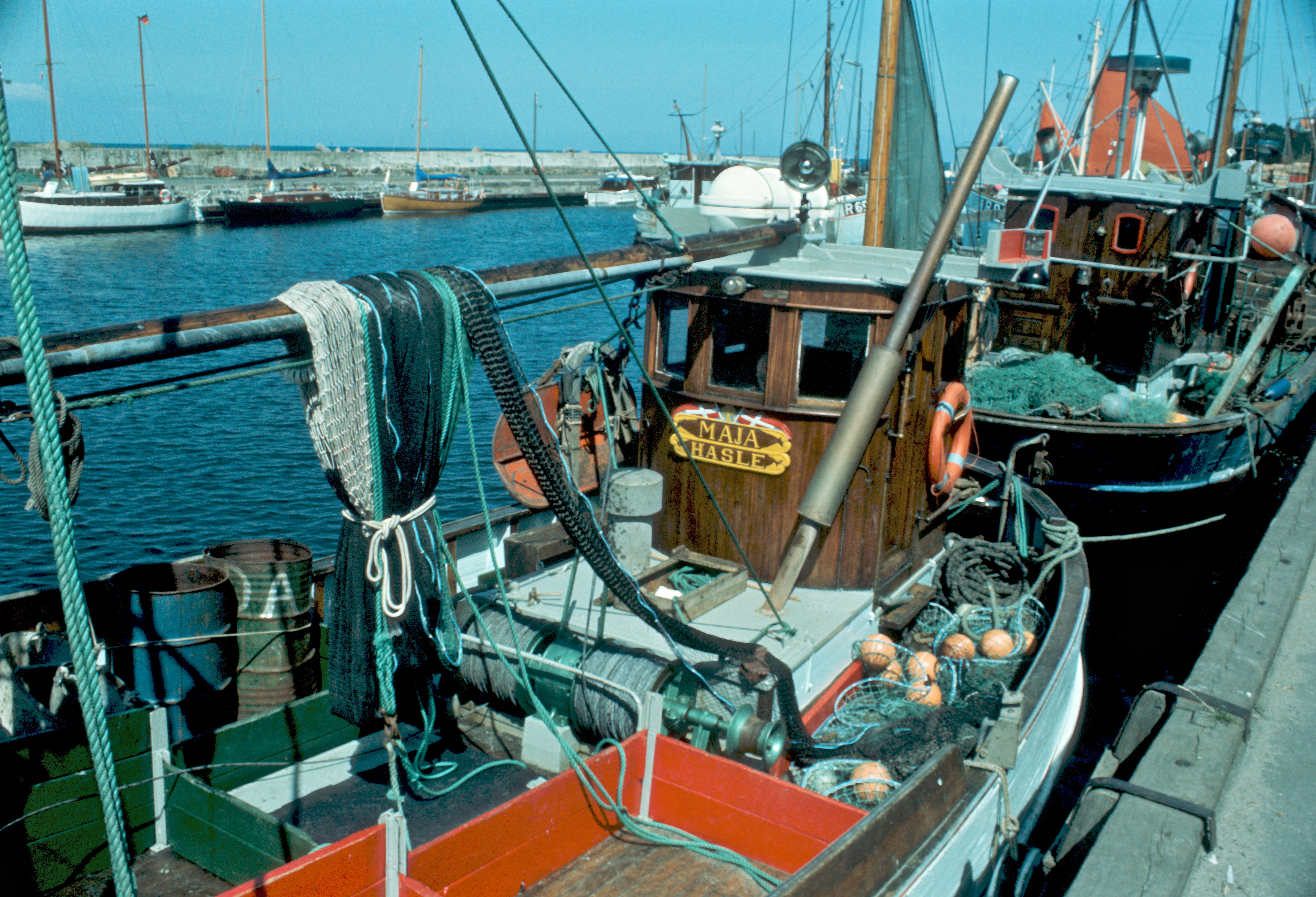 fiskerbåd "Maja" i Hasle havn, 1973